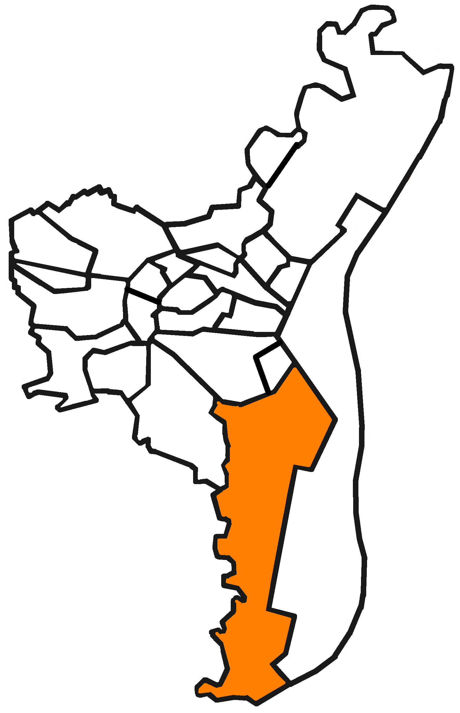 Localisation du quartier du Neuhof à Strasbourg